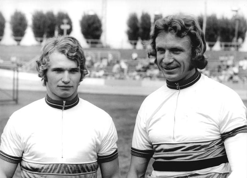 Klaus Grünke, Thomas Huschke ADN-ZB Junge 30-8-75 Berlin: Bahnradsport-Weltmeister stellten sich vor - Anläßlich der DDR-Meisterschaften im Zweier-Mannschaftsfahren wurden auf der Radrennbahn in Berlin-Weißensee die DDR-Medaillengewinner der Weltmeisterschaften von Lüttich von den 1200 Zuschauern auf einer Begrüßungsrunde stürmisch gefeiert. Im Mittelpunkt standen die beiden WEltmeister Klaus Grünke (links-1000-m-Zeitfahren) und Thomas Nuschke (rechts-4000-m-Einzel-Verfolgungsfahren - beide TSC Berlin).